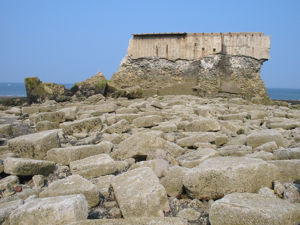 Photo personnelle (J.CAPEZ)des ruines du Fort de l'Heurt à Le Portel Plage. Libre de toute reproduction